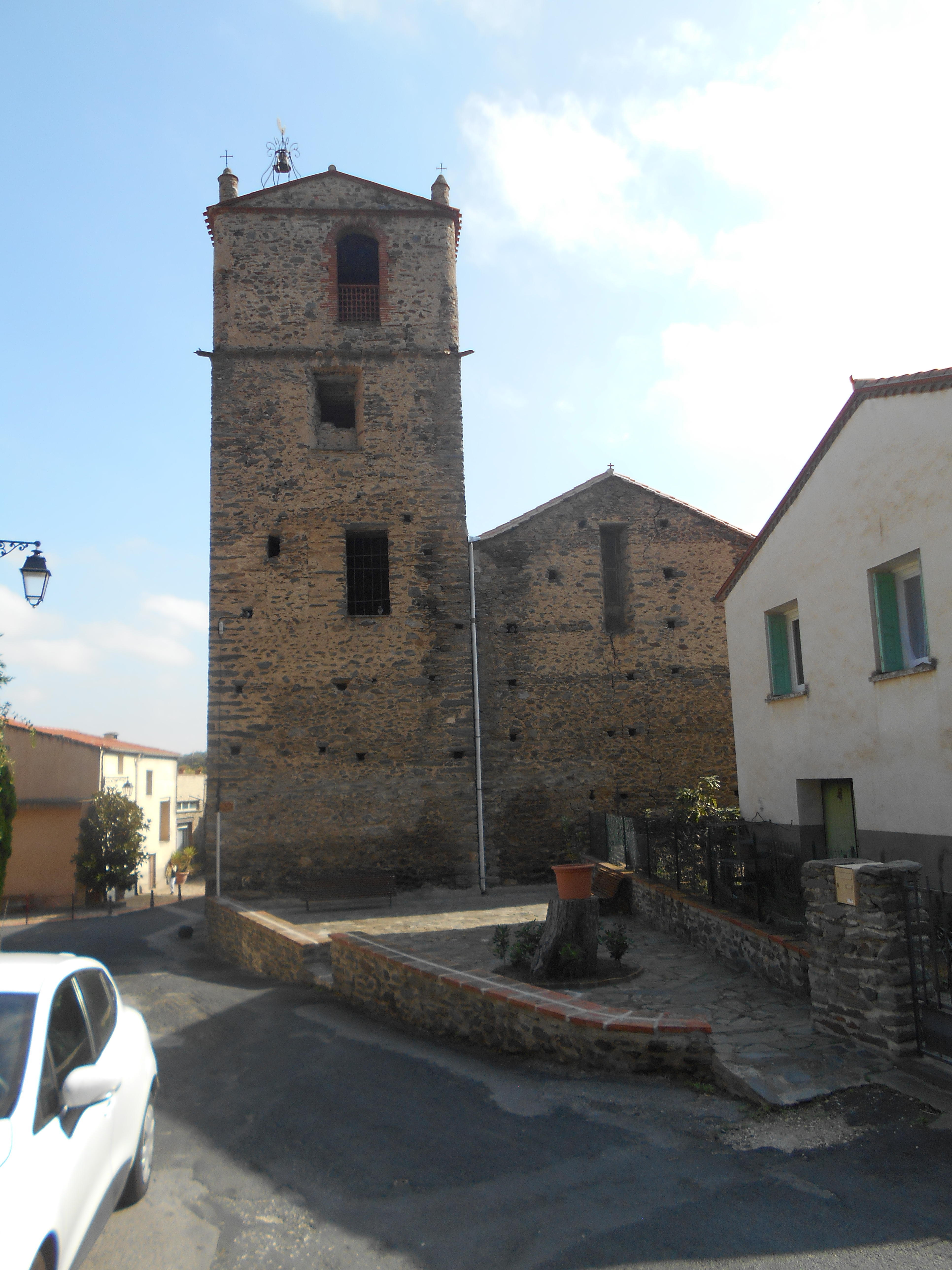 Santa Eulàlia de Rigardà. Façana occidental